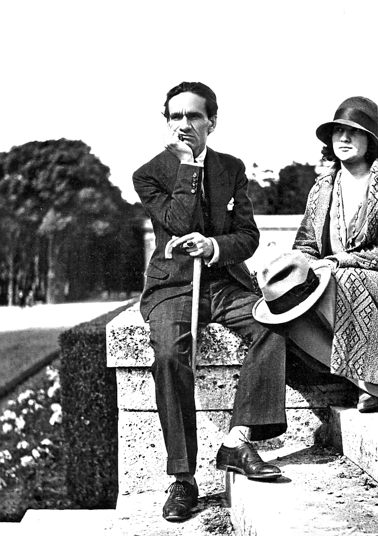 Famosa fotografia de César Vallejo en el Parque de Versalles, sin cortar (con Georgette)